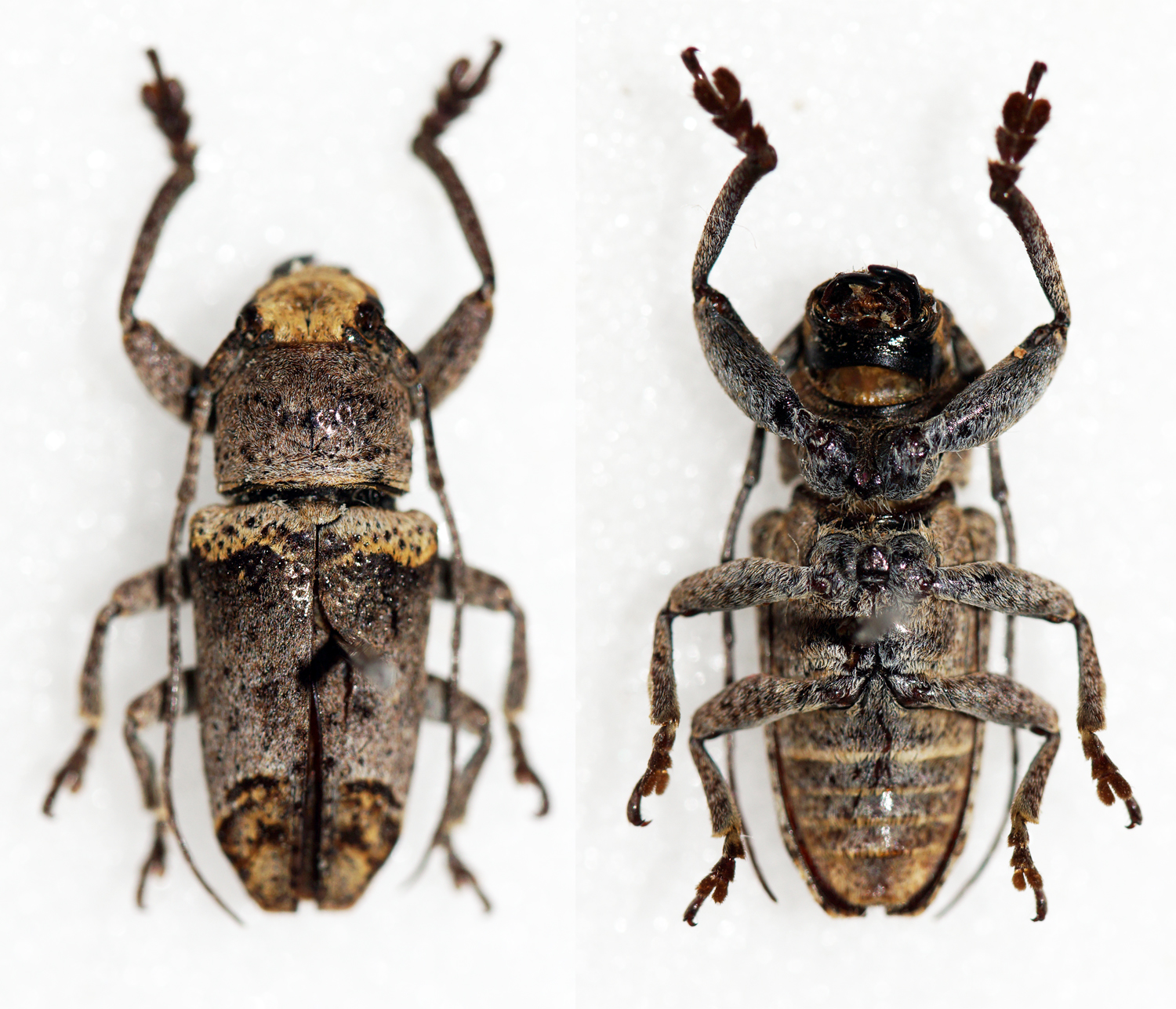 Vives,2009 Sex: Male Data: 03-2014 - Atok - Benguet - Eastern Luzon - Philippines Size: 12mm